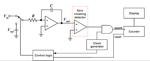 صورة لفولتمتر رقمي